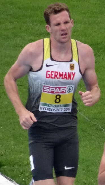 Młodzieżowe Mistrzostwa Europy w Lekkoatletyce U23 w Bydgoszczy 2017; dziesięciobój mężczyzn, bieg na 1500 m finał